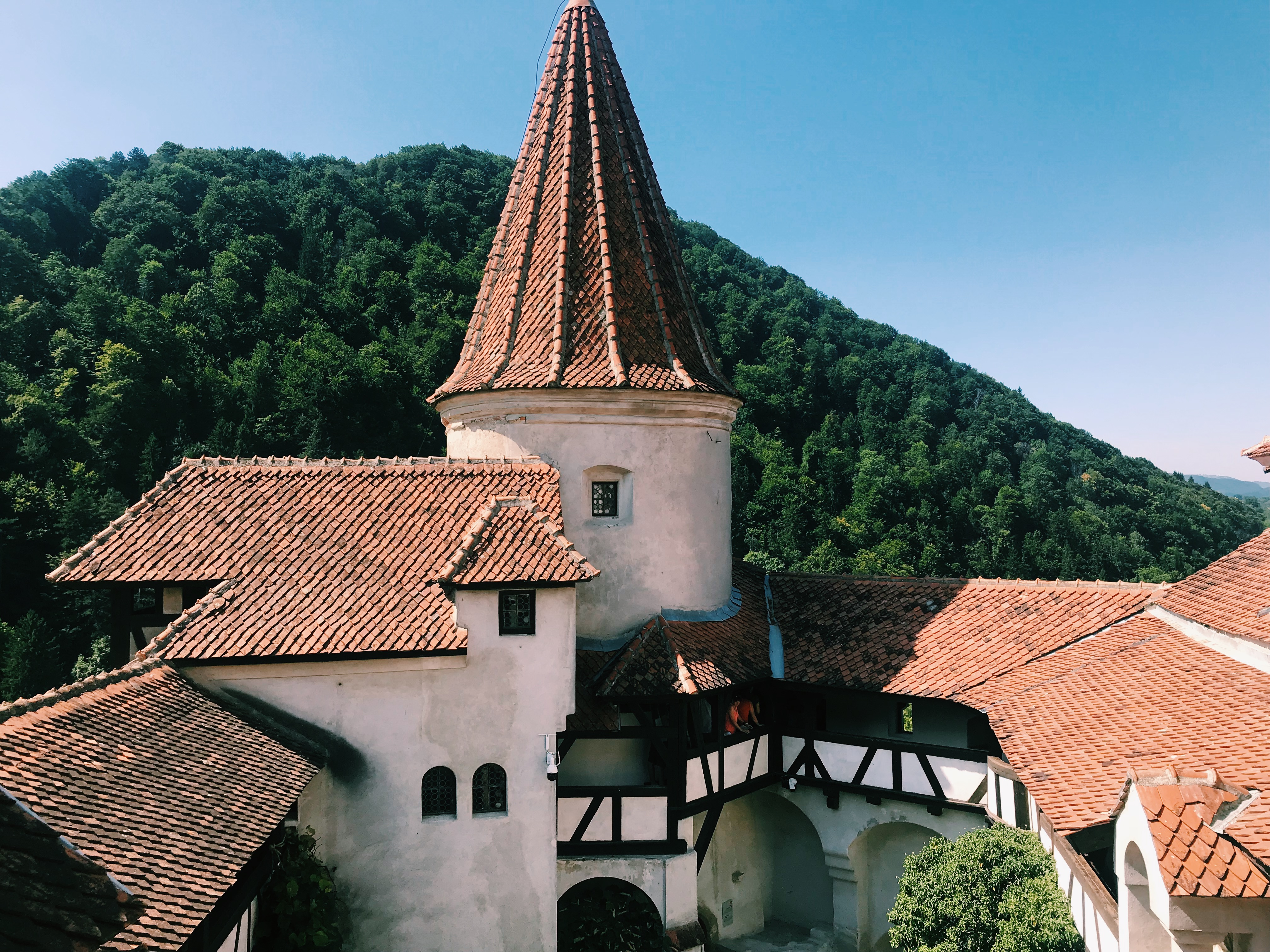 Aynı zamanda Drakula'nın Kalesi olarak da bilinen Bran Kalesi bu isminini Bram Stoker'ın Drakula adlı hikayesinden aldığı söylenir.